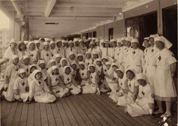 中文（香港）: 1930年代香港聖約翰救護機構成員合照。